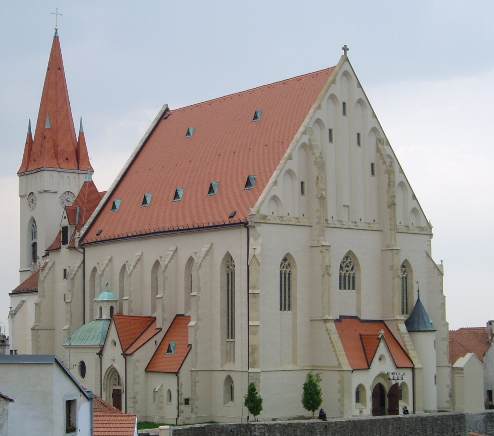 Zelfgemaakte foto van de kerk van Znojmo tijdens uitwisseling met Znojmo. Gemaakt op 7 mei 2006